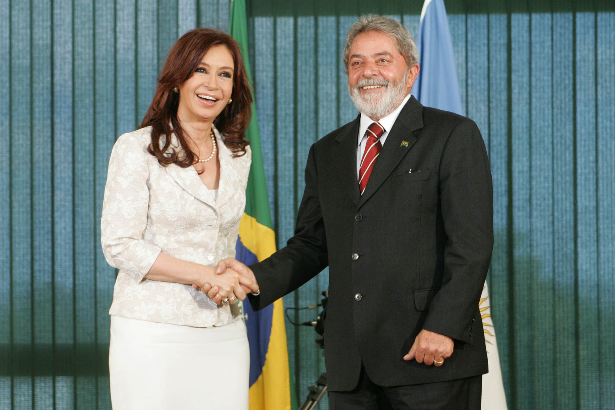 Cristina y Lula. Las subo para usar en Wikinews en mi artículo.